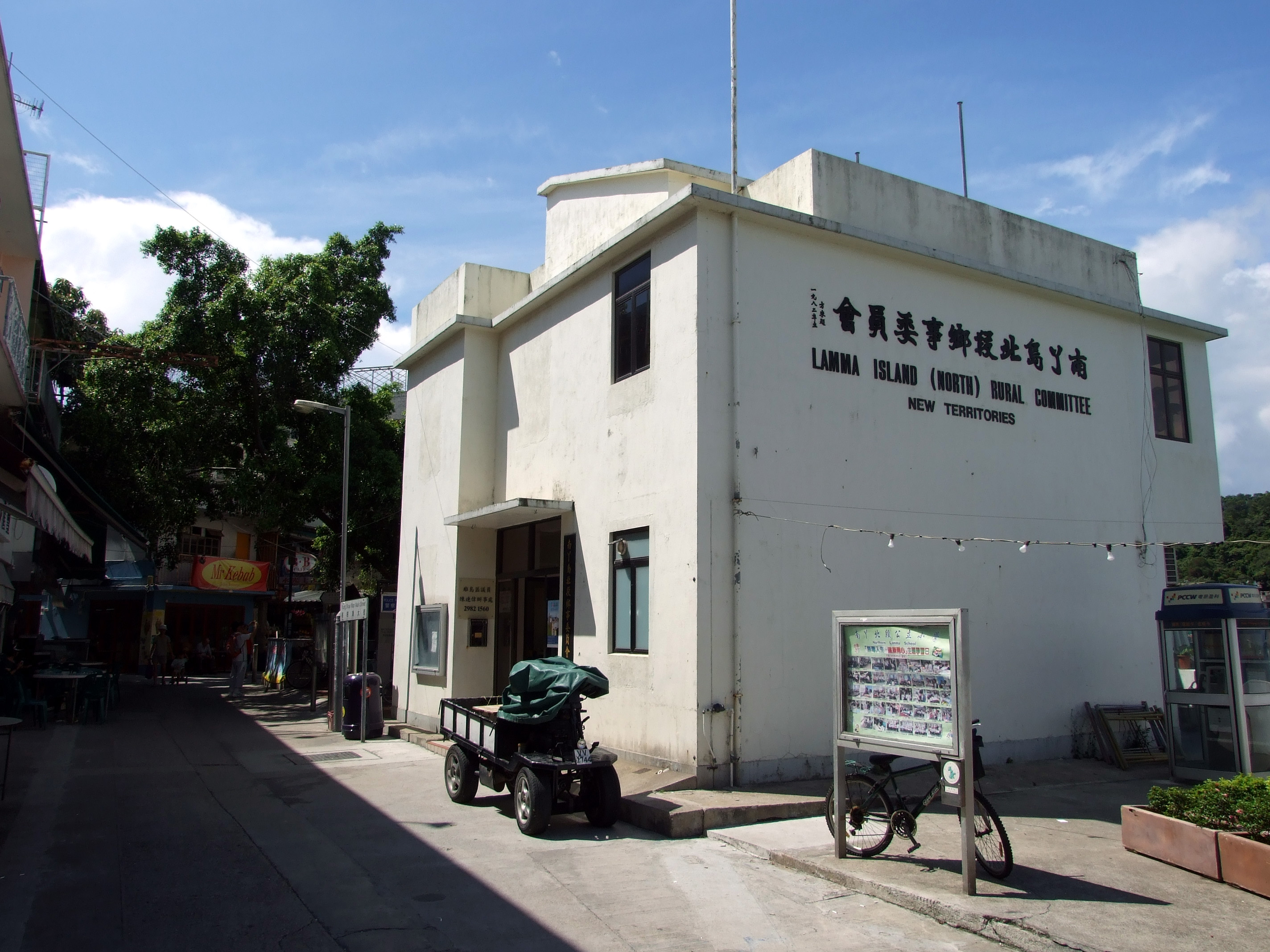 中文（香港）: 南丫島北段鄉事委員會